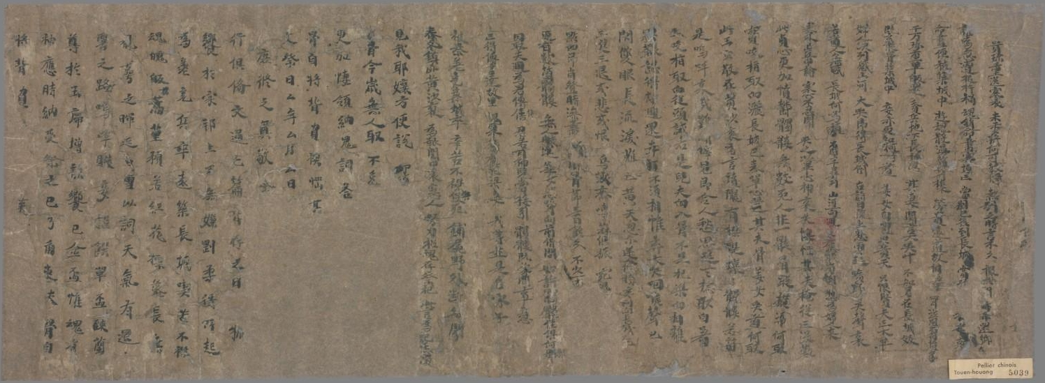 Meng Jiang nü bian wen